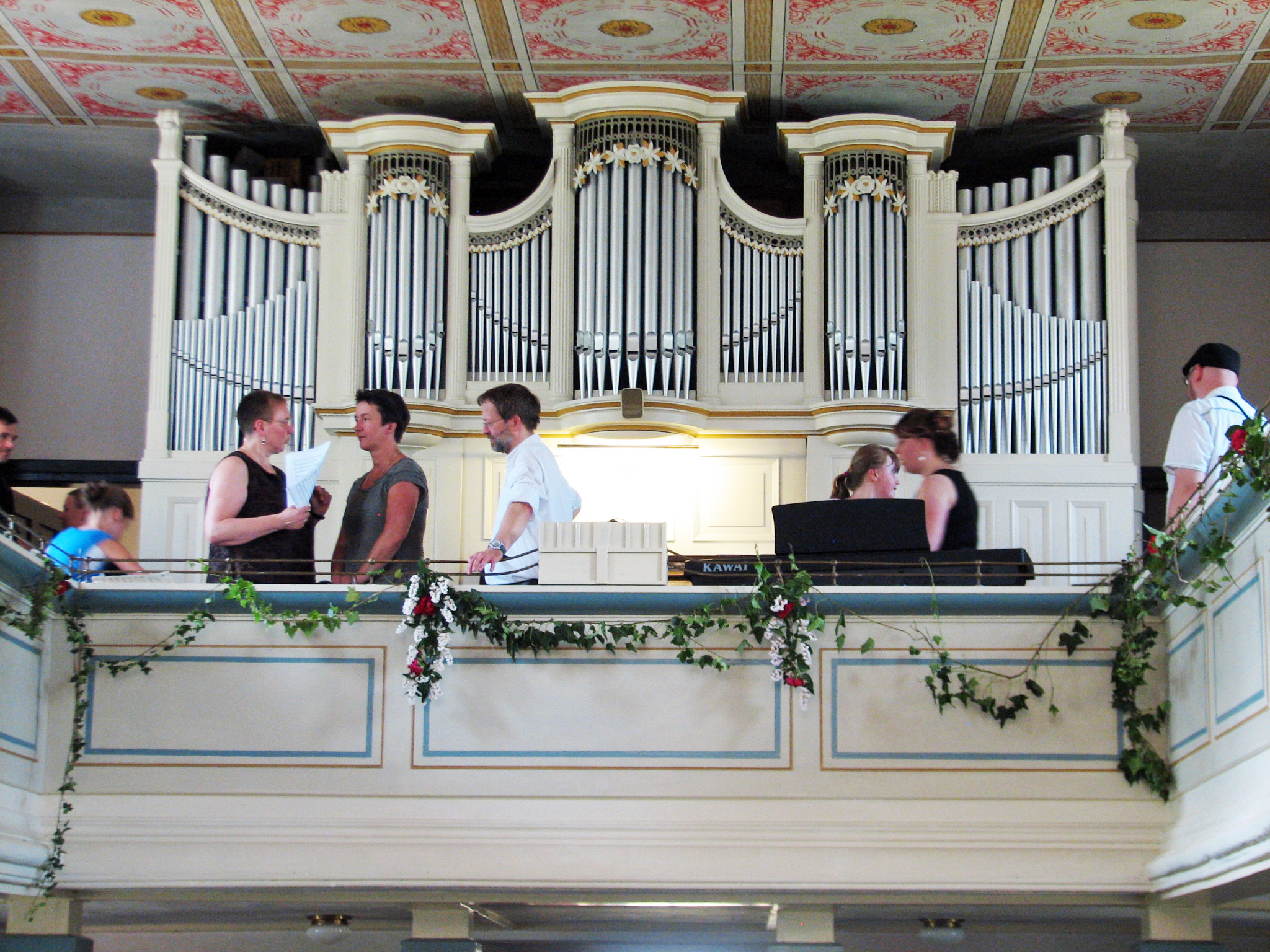 Die restaurierte Jehmlich-Orgel erklang zum Orgel- und Kirchweihfest am 9. Juni 2018